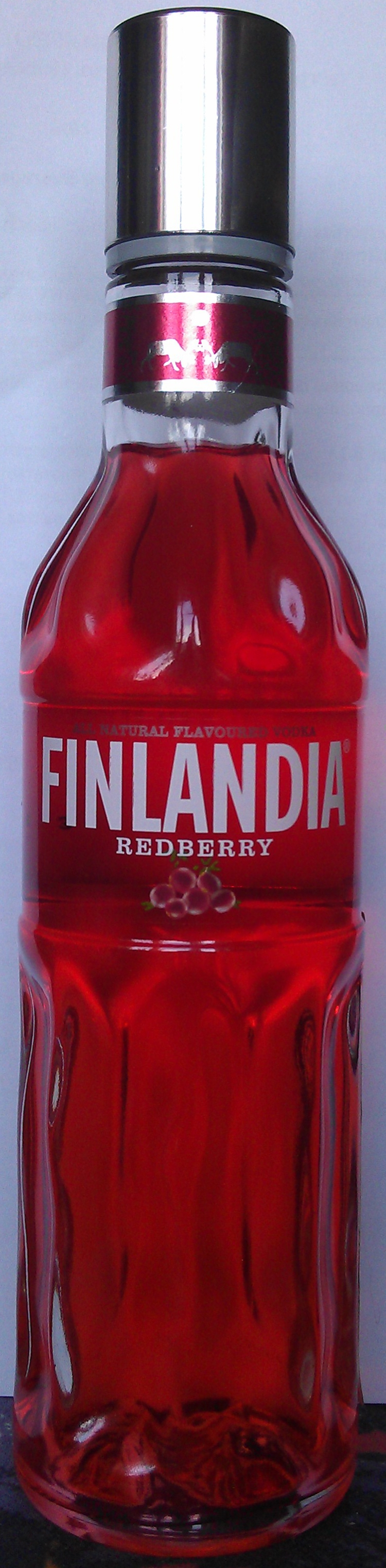 Бутылка клюквенной настойки Finlandia Redberry, фотография сделана мной после покупки в магазине.